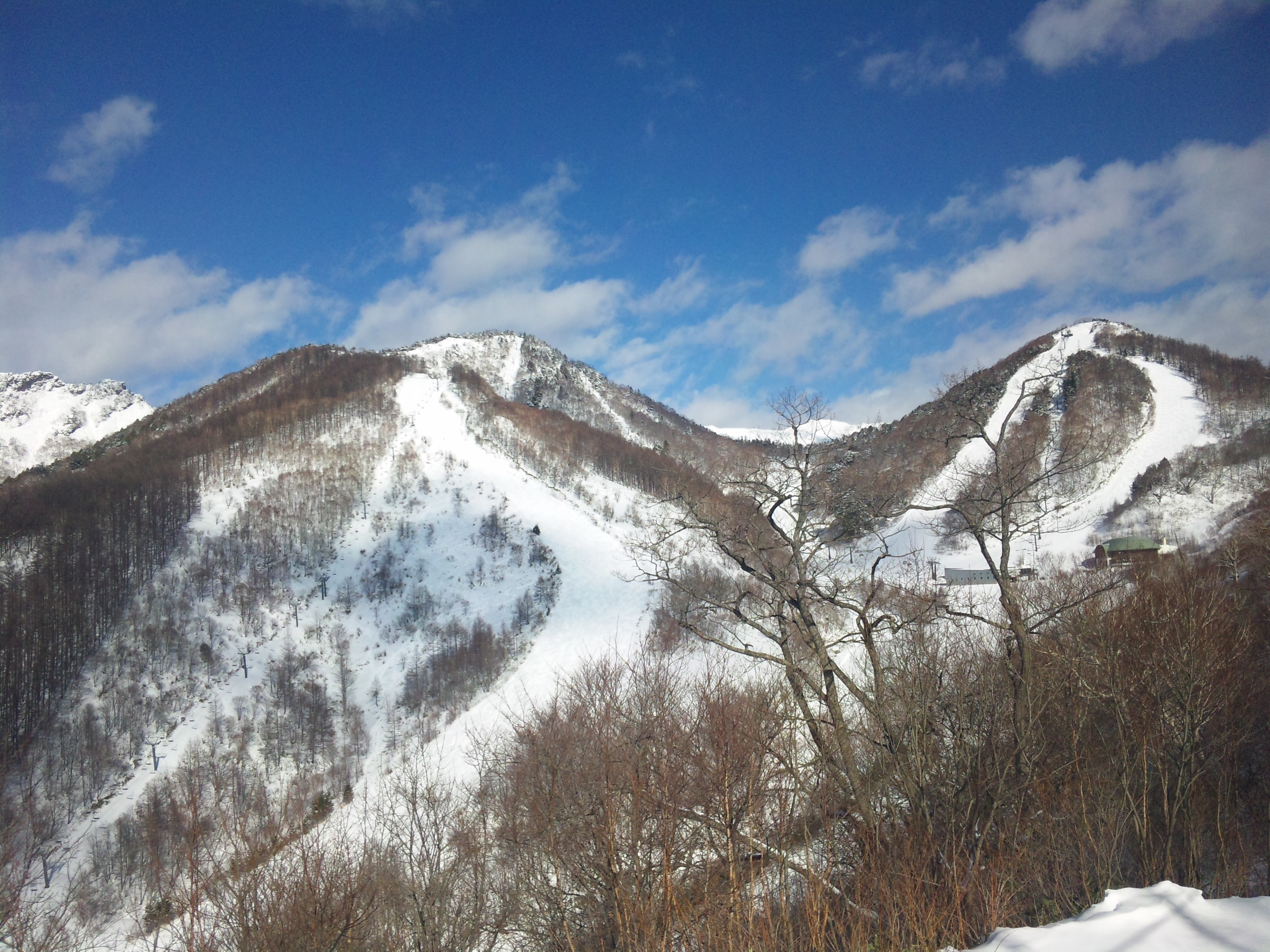 川場スキー場 桜川クリスタル 方面